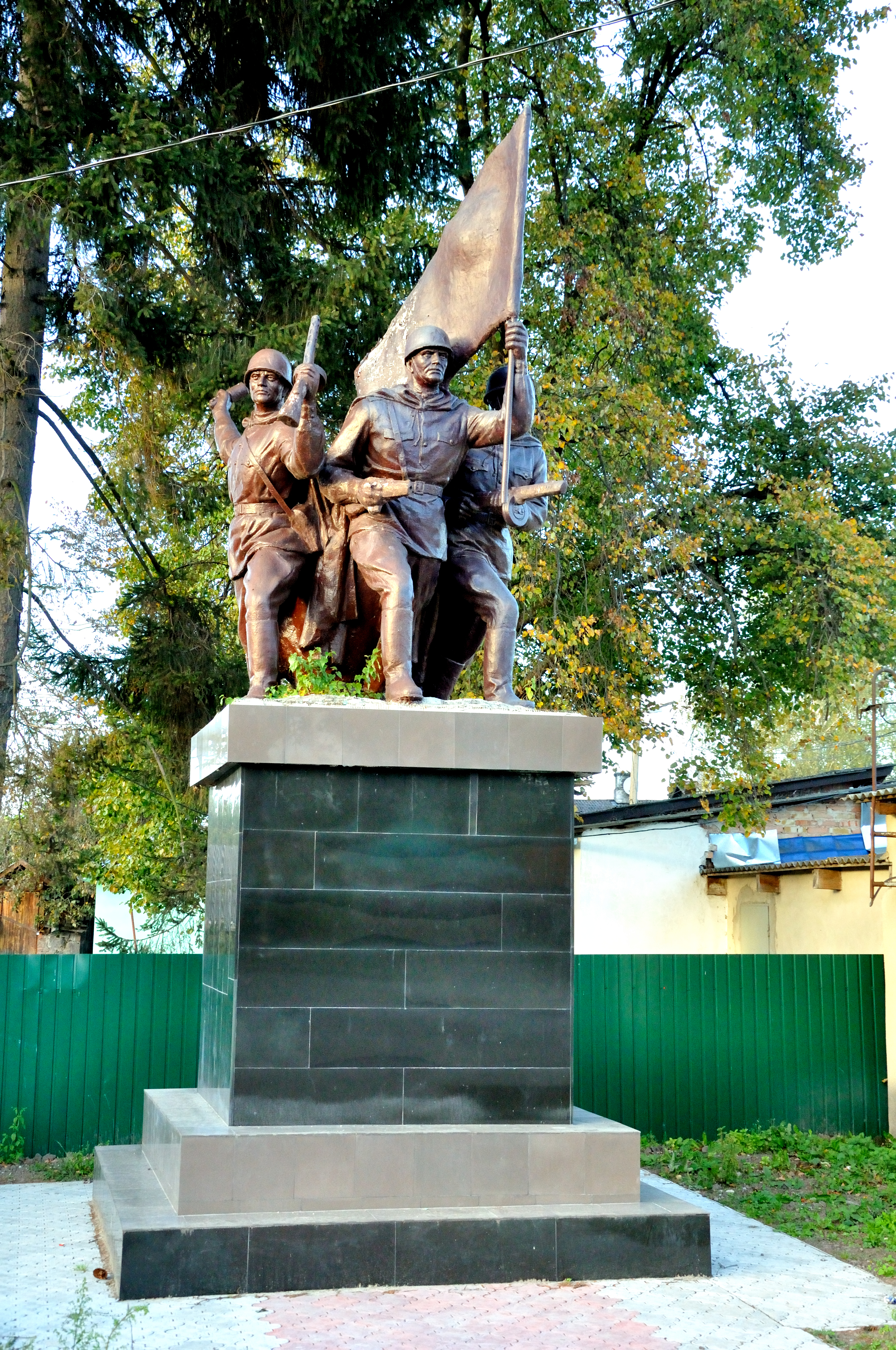 Пам'ятник радянським воїнам, смт. Клевань, вул. Центральна,2